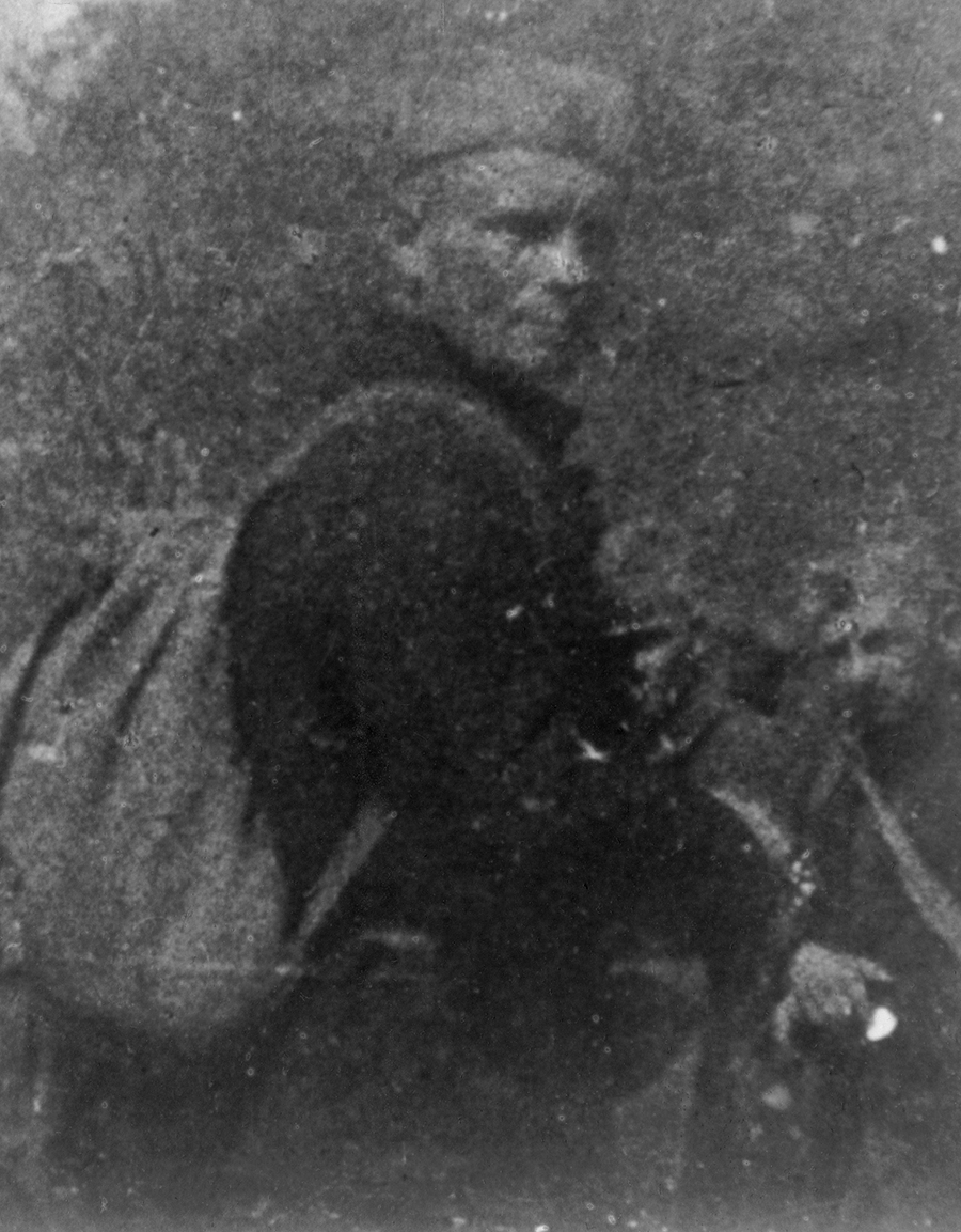 Srpski (latinica): Rade Milićević, narodni heroj Jugoslavije